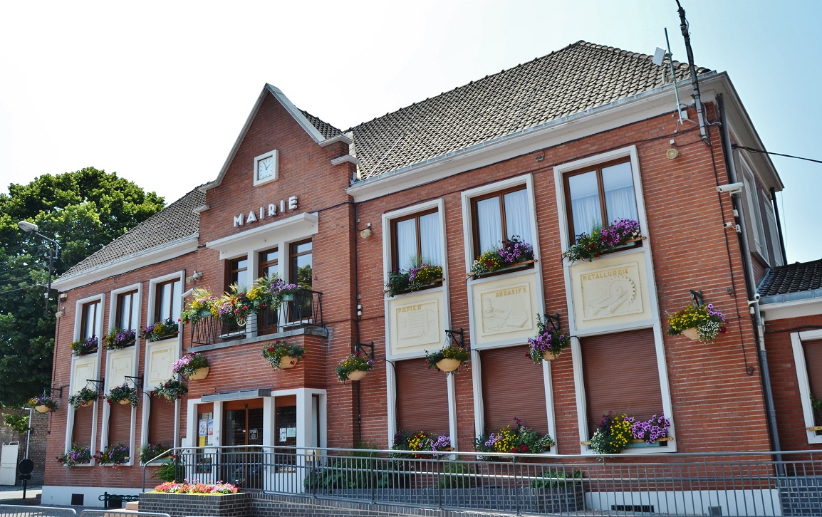 La Mairie